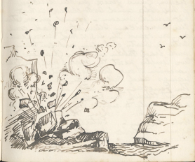 神子元島灯台の建設風景、マクヴェインのスケッチ、1869年4月